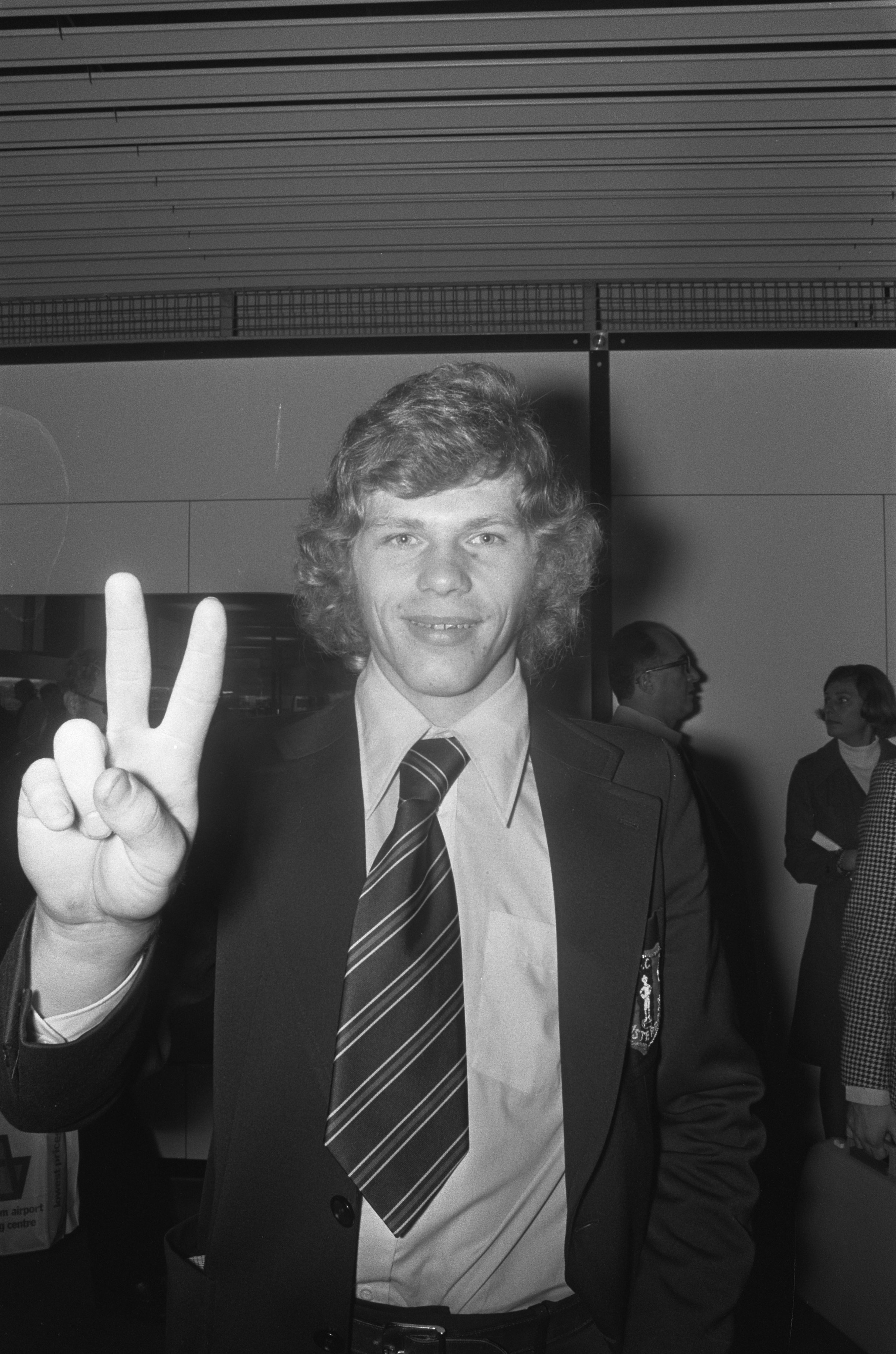 Collectie / Archief : Fotocollectie Anefo Reportage / Serie : [ onbekend ] Beschrijving : FC Amsterdam op Schiphol na wedstrijd tegen Inter Milaa Nico Jansen Datum : 24 oktober 1974 Locatie : Noord-Holland, Schiphol Trefwoorden : VERTREKKEN, sport, voetbal Persoonsnaam : Jansen, Nico Instellingsnaam : FC Amsterdam, Inter Milaan Fotograaf : Peters, Hans / Anefo Auteursrechthebbende : Nationaal Archief Materiaalsoort : Negatief (zwart/wit) Nummer archiefinventaris : bekijk toegang 2.24.01.05 Bestanddeelnummer : 927-5396